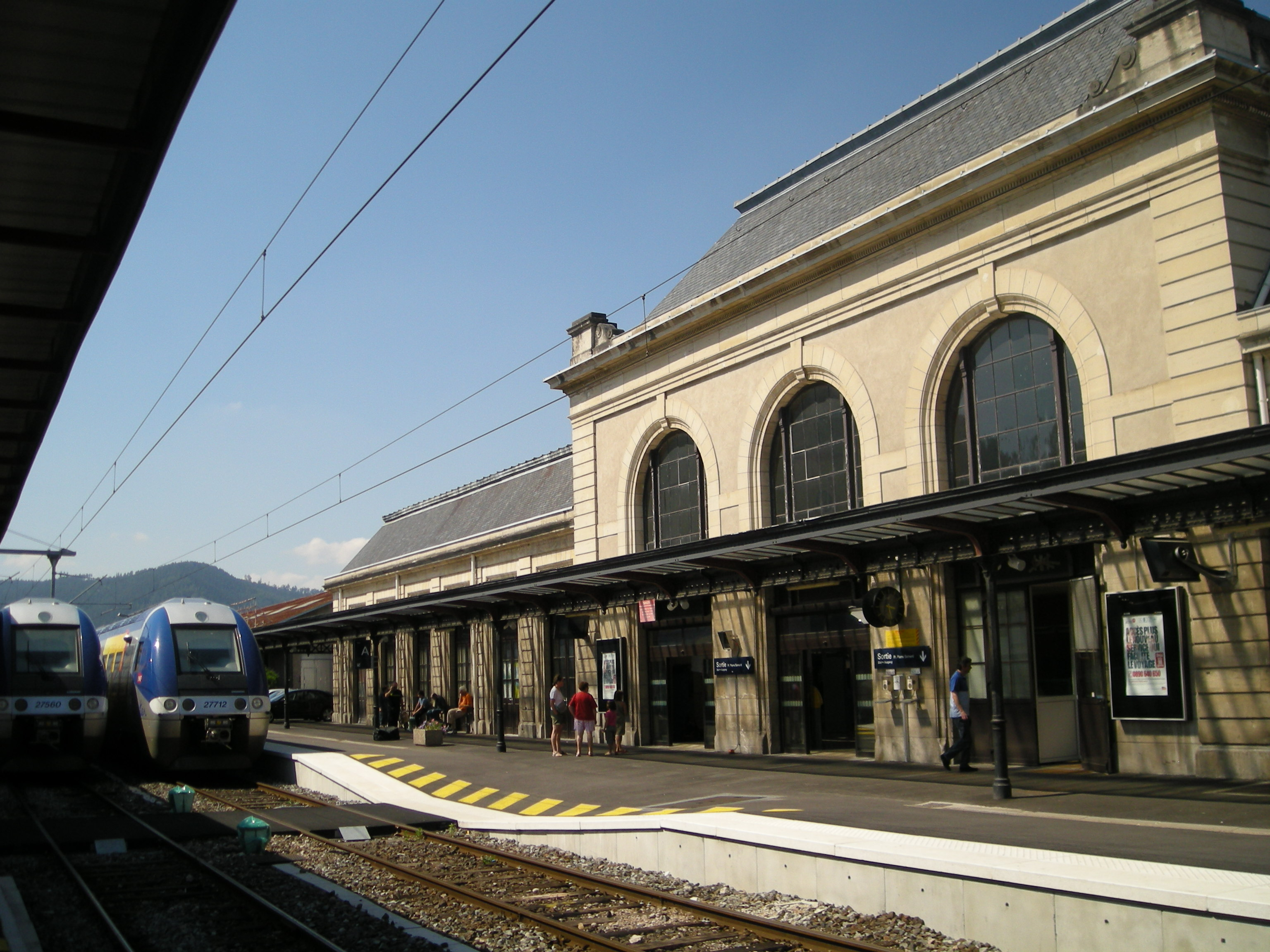 2 trains TER Lorraine en gare de Saint-Dié-des-Vosges (France)